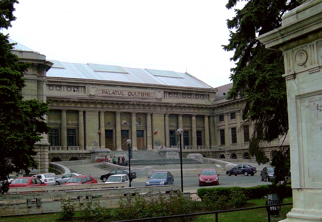 PALATUL CULTURII (Kulturpalast), Ploiesti (Rumänien)